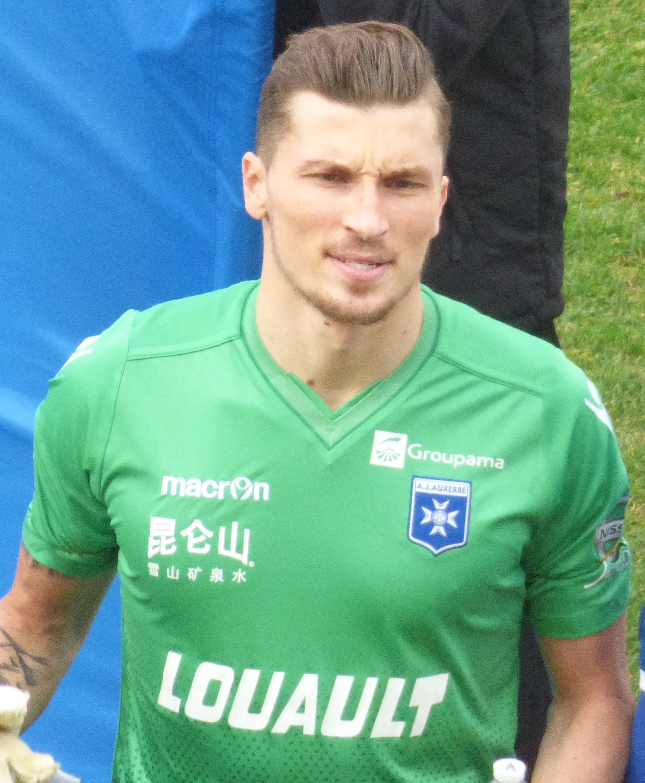 Mathieu Michel avant le match RC Lens - AJ Auxerre, comptant pour la 28ème journée du championnat de France de football de Ligue 2 2018-2019, le 9 mars 2019 au Stade Bollaert-Delelis.